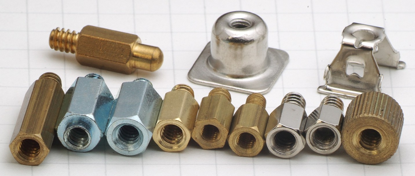 Montageteile für Mainboards